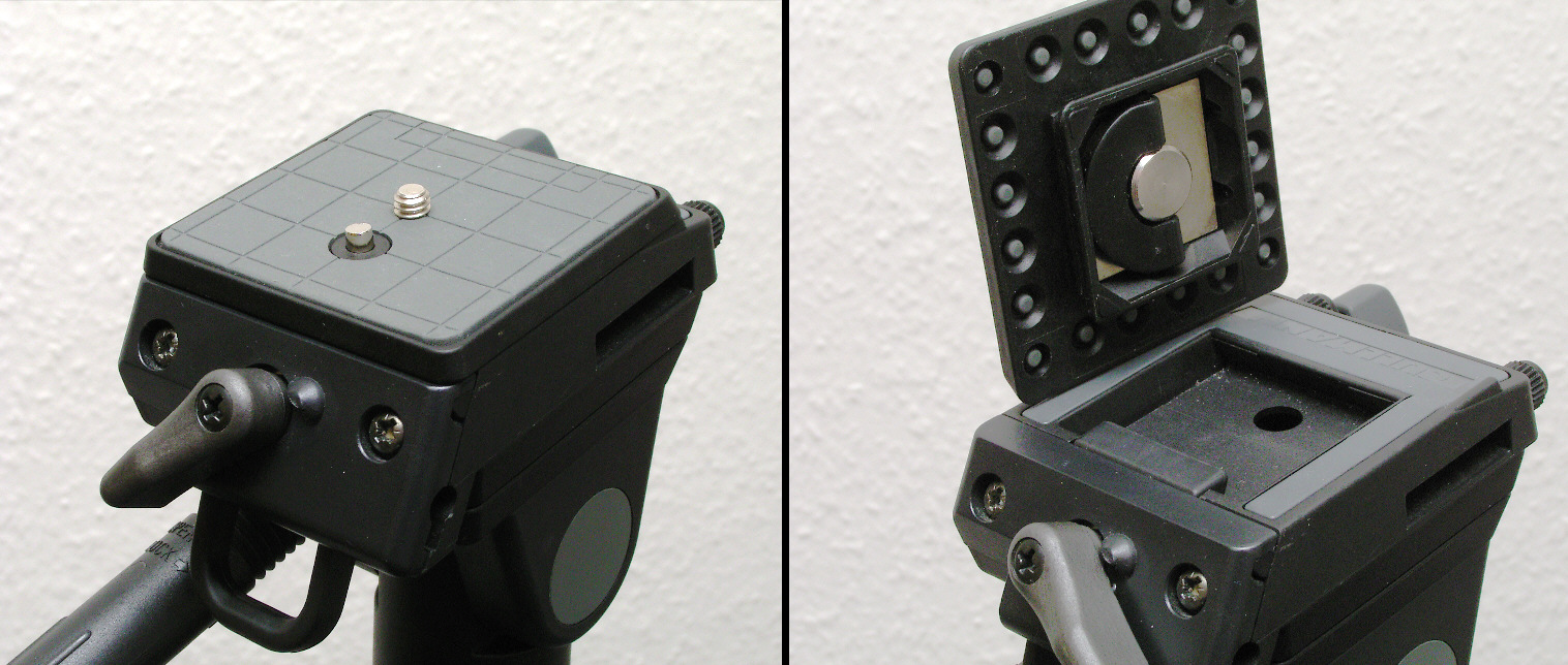 3D-Neiger des Cullmann Stativs 2550 mit Schnellwechselplatte